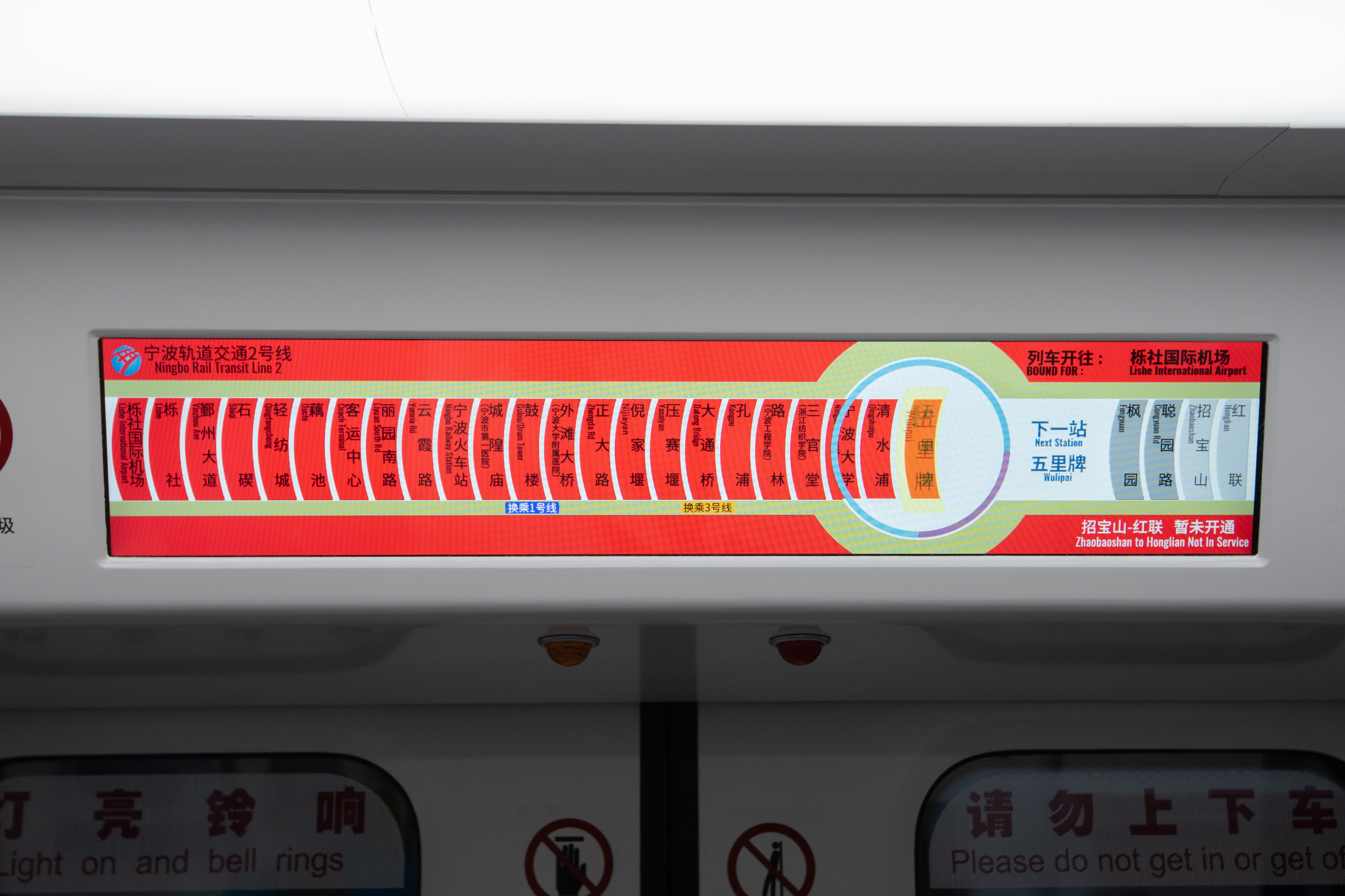 波轨道交通2号线列车LCD，招宝山至红联缓开